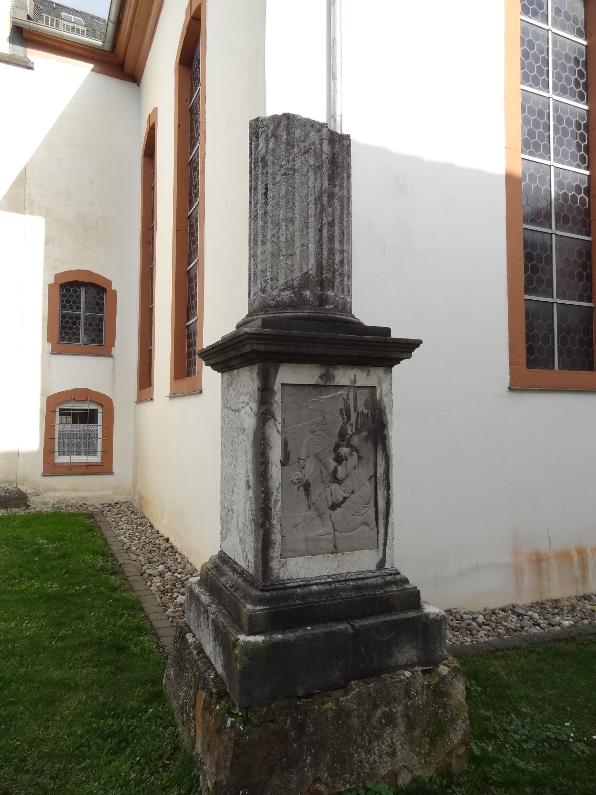 Evangelische Kirche Langsdorf (Lich)